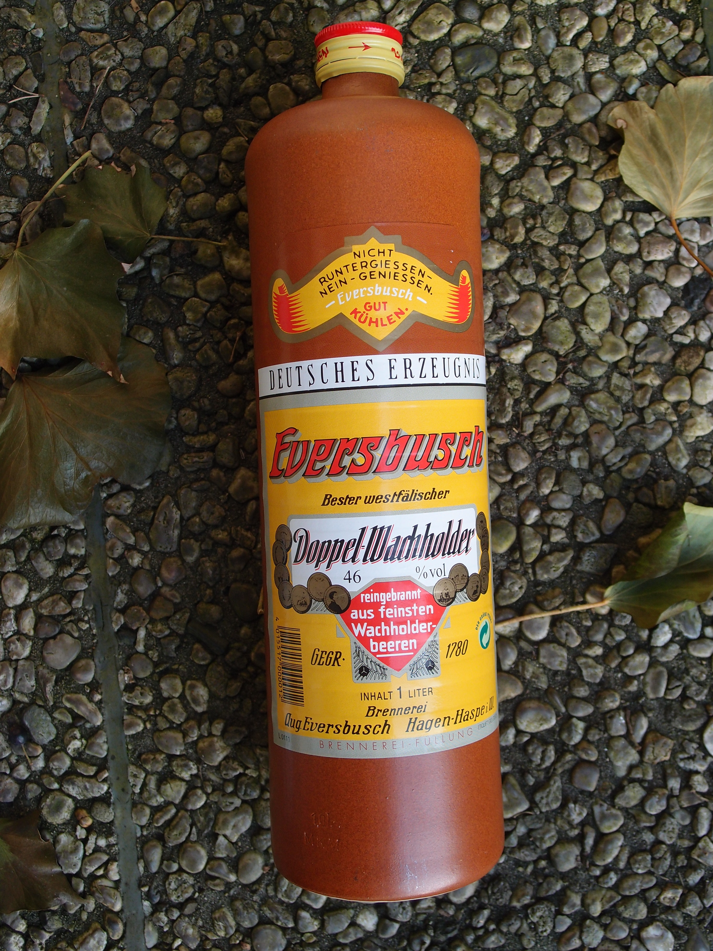 Eversbusch Doppel-Wacholder (46 %), Traditionsbrennerei Eversbusch (Eversbusch August oHG) in Haspe (Hagen)